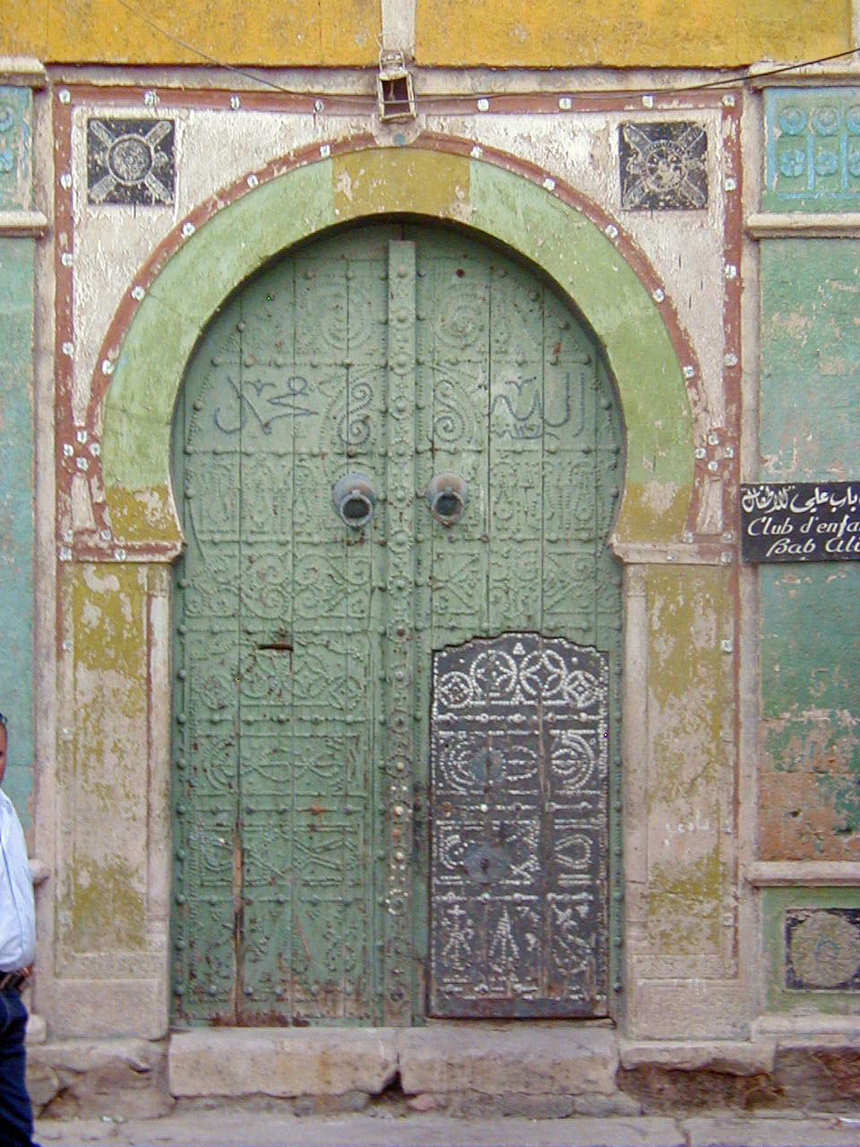 Porte du mausolée de Sidi Baba Ali Smadhi, Béja, Tunisie